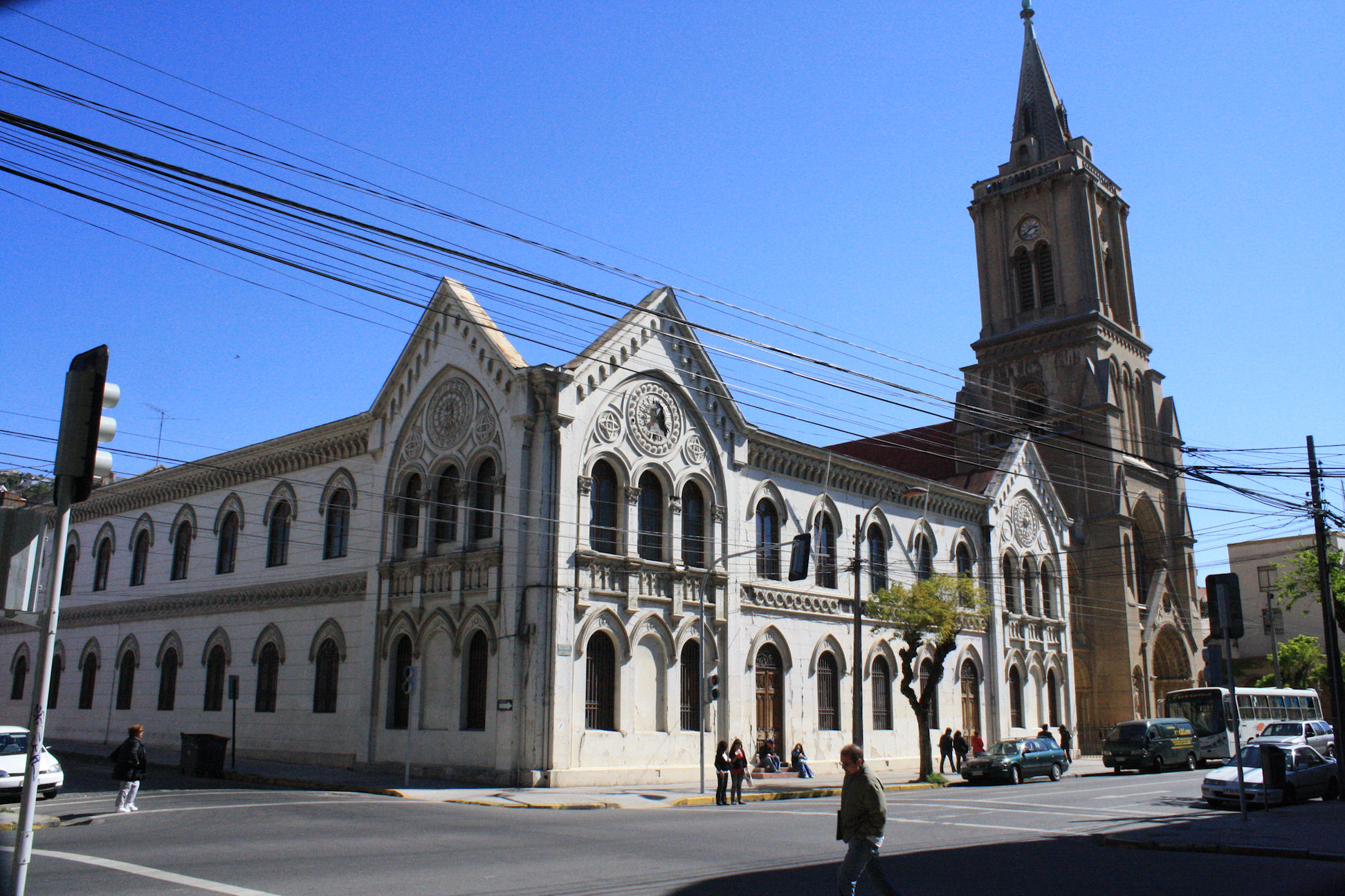 Valparaiso